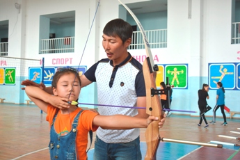 Михаил Оюн открыл в новом спорткомплексе Бай-Хаака секцию по стрельбе из лука